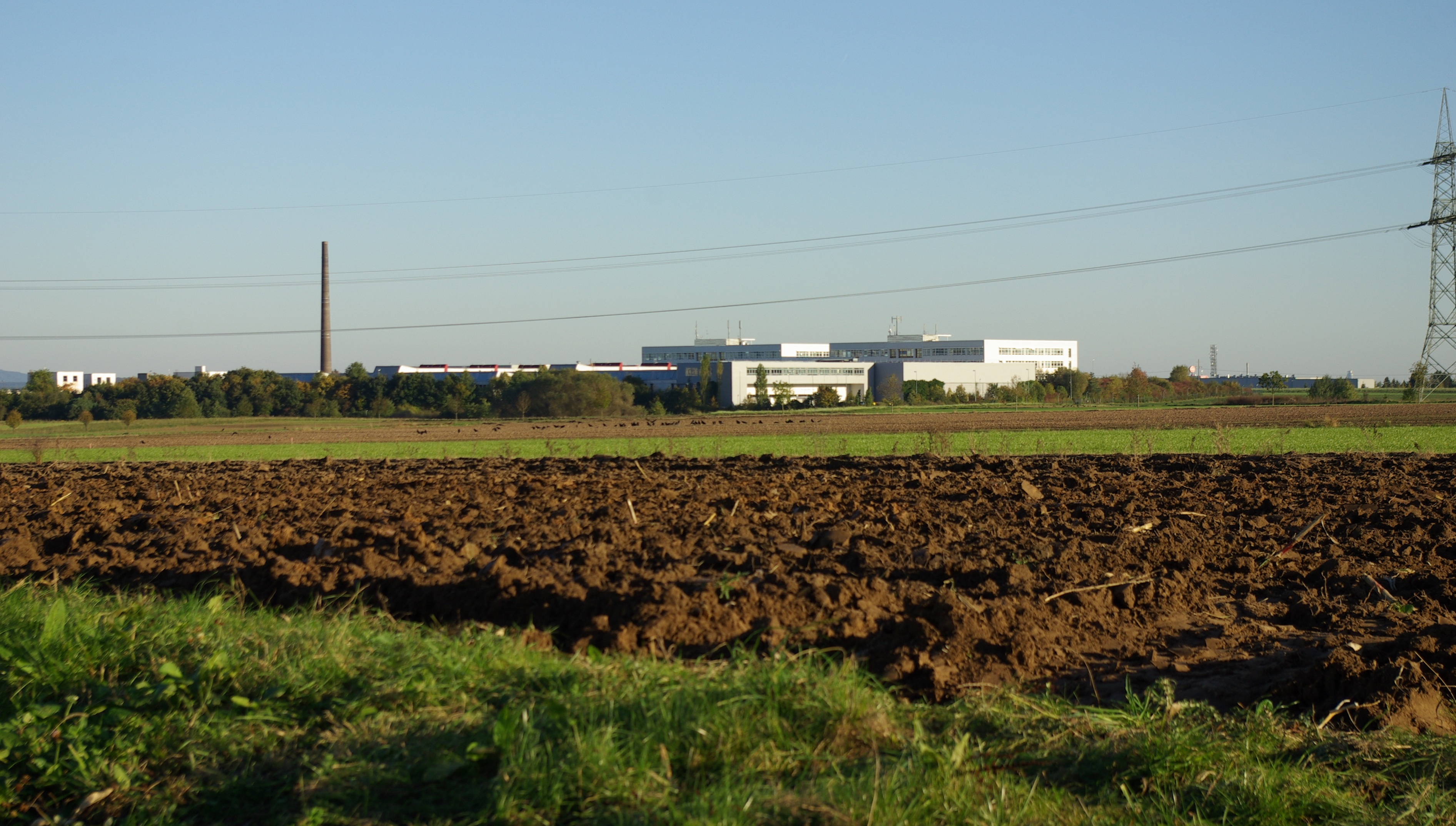 Siemens Gerätewerk Erlangen, Stadtteil Büchenbach